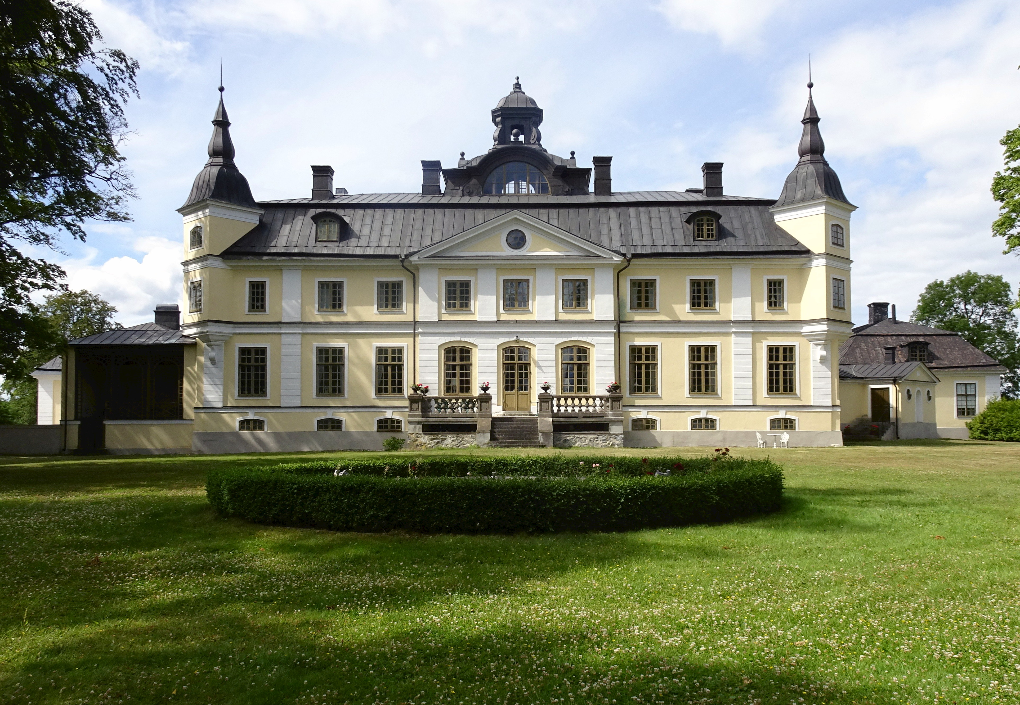 Sparreholms slott, gårdsfasad